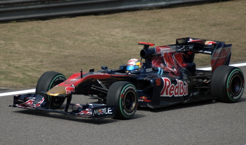 Buemi at the Shanghai F1 Qualifying